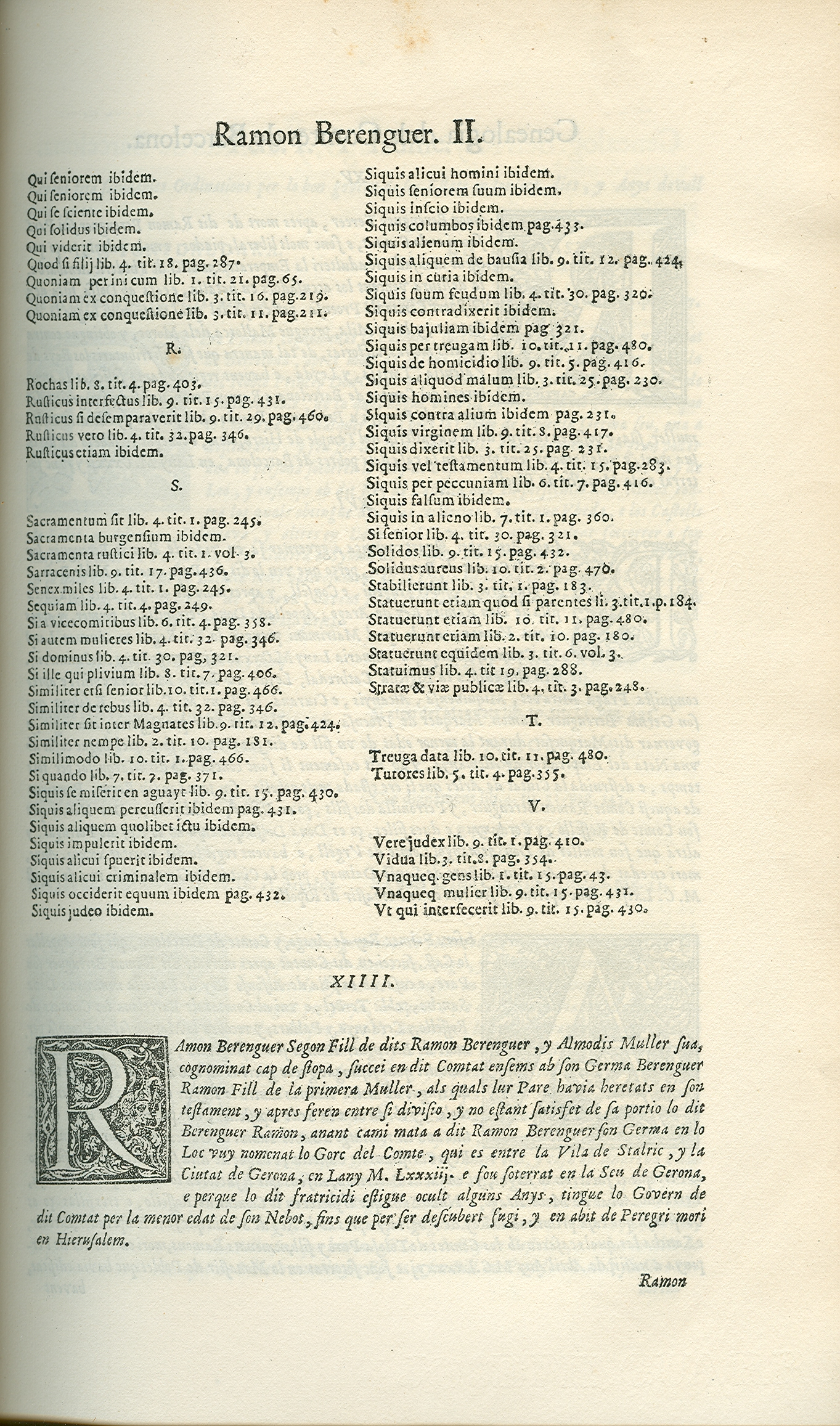 Ramon Berenguer and Almodis Genealogy in the Catalan Constitutions.